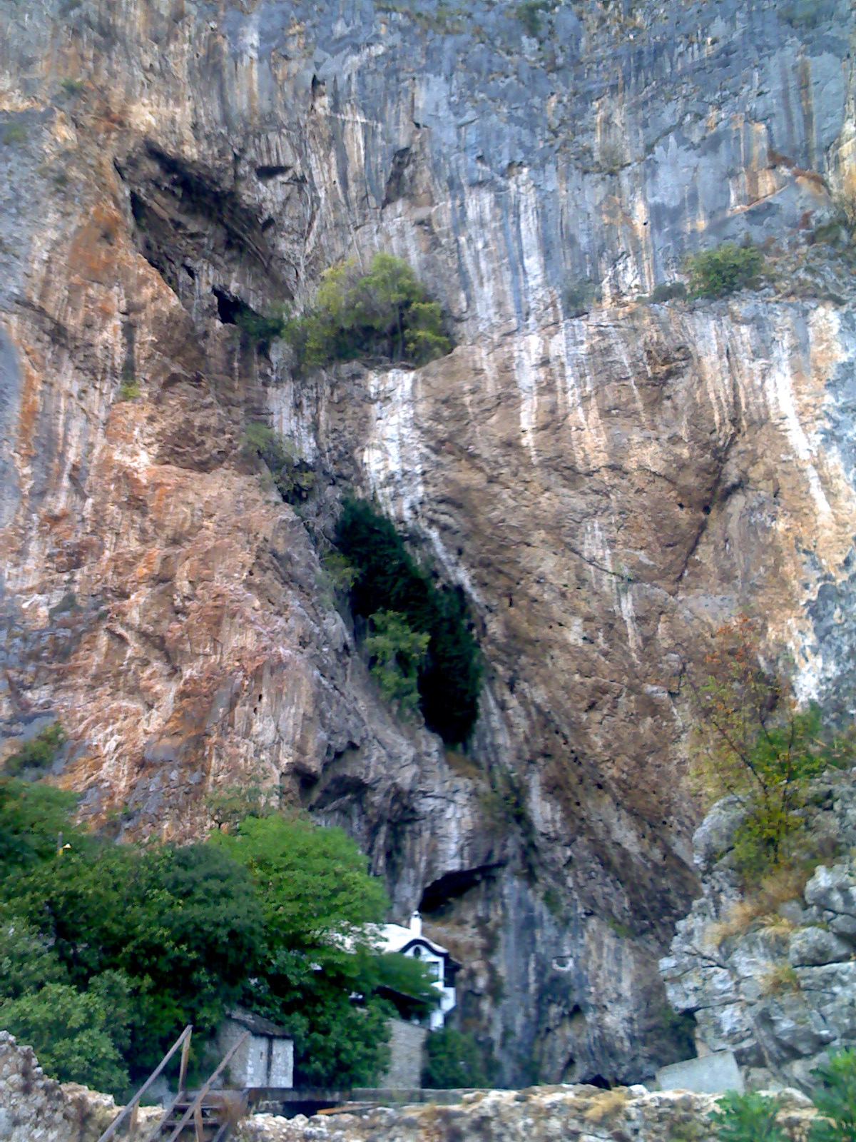 Takija place